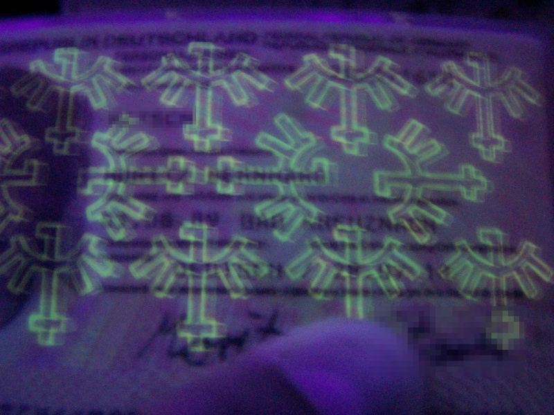 Fotografie eines deutschen Personalausweises unter einer UV-Röhre.